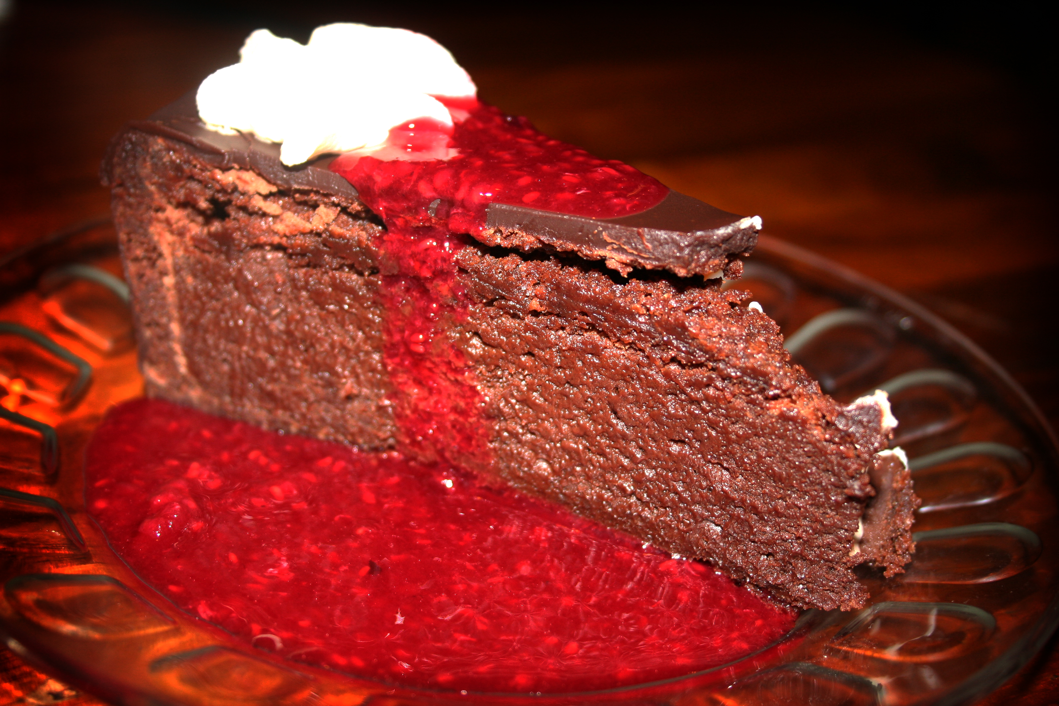 Alicia's dessert